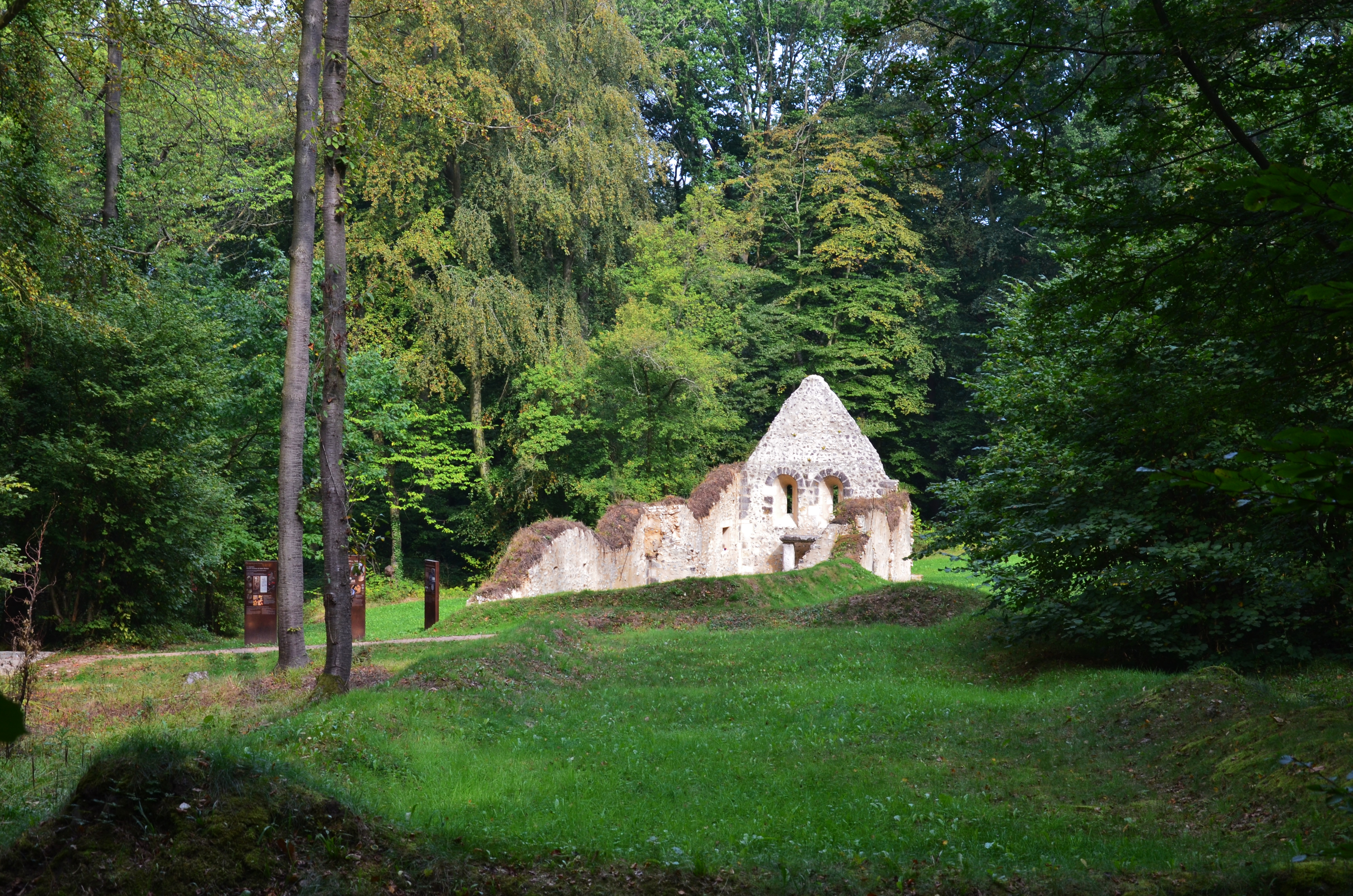 Maladrerie Saint-Thomas-Becket